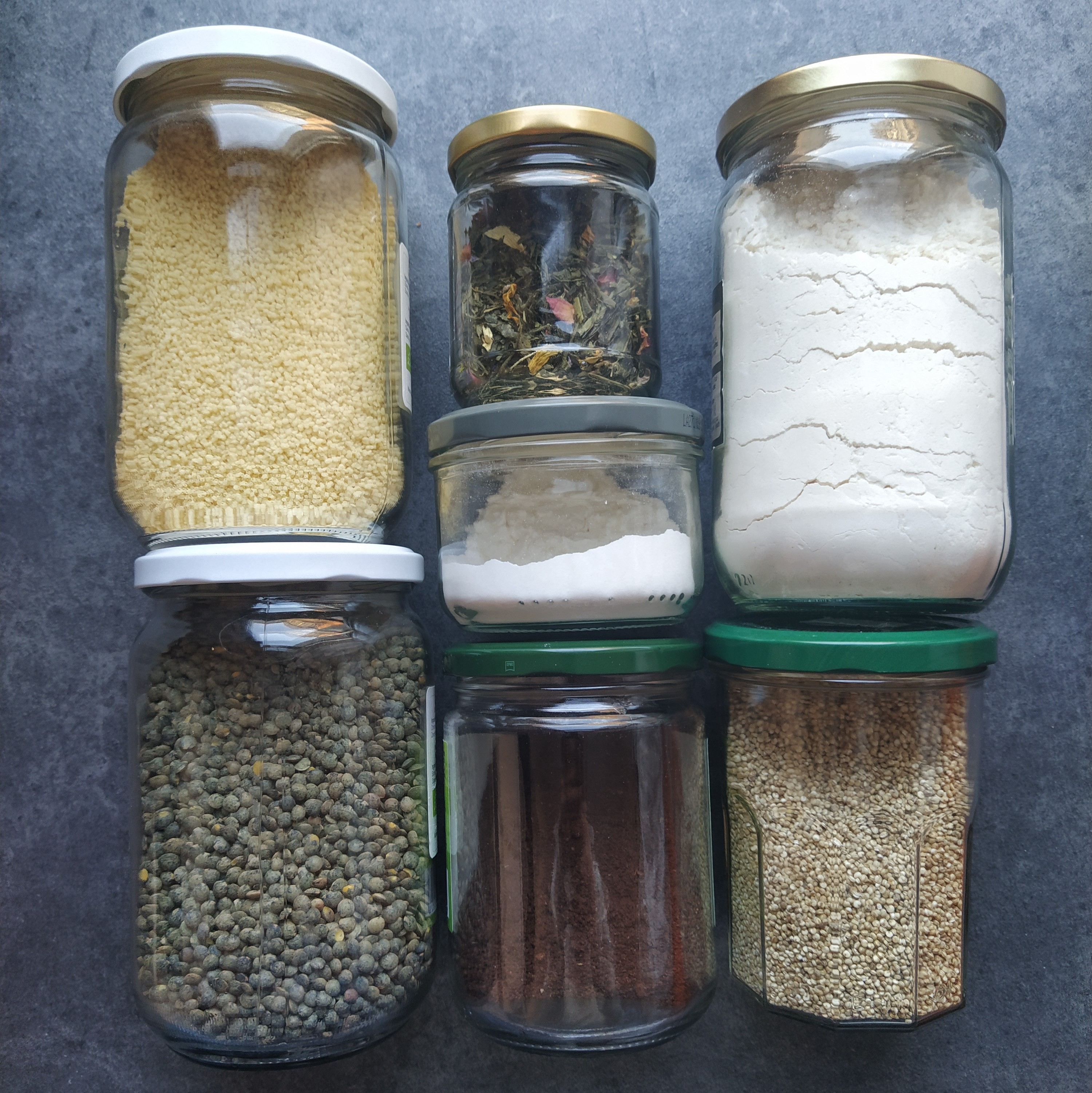 Les bocaux permettent de conserver les aliments en supprimant les emballage jetables